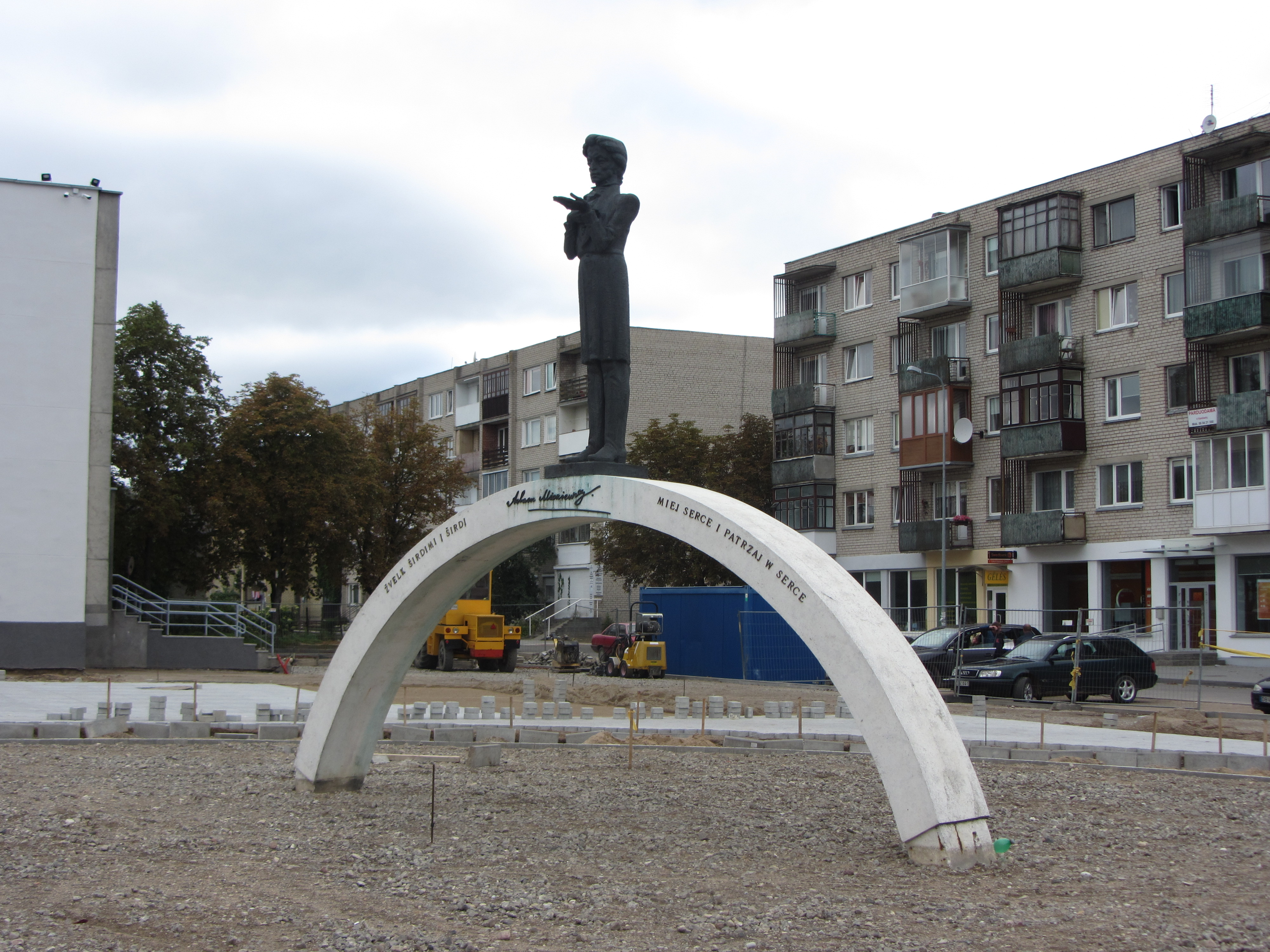 Šalčininkai, Lithuania